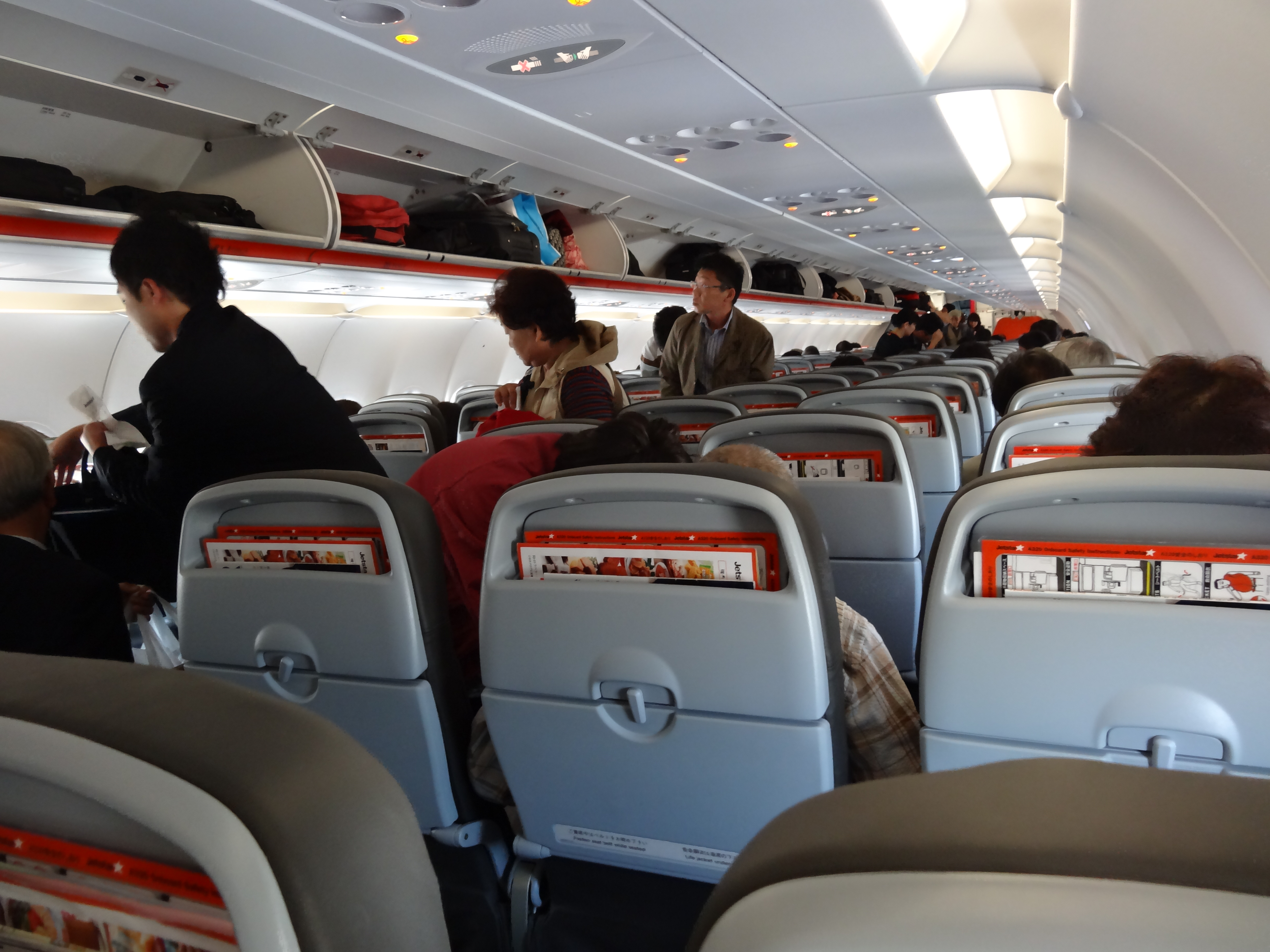 Jetstar A320機内（国内線・JA03JJ）